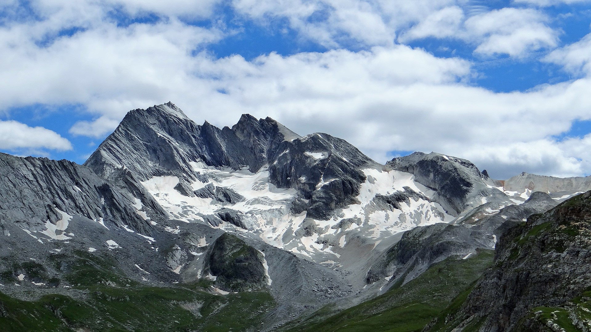 Pointe de l'Echelle(3422m) et glacier de la Masse